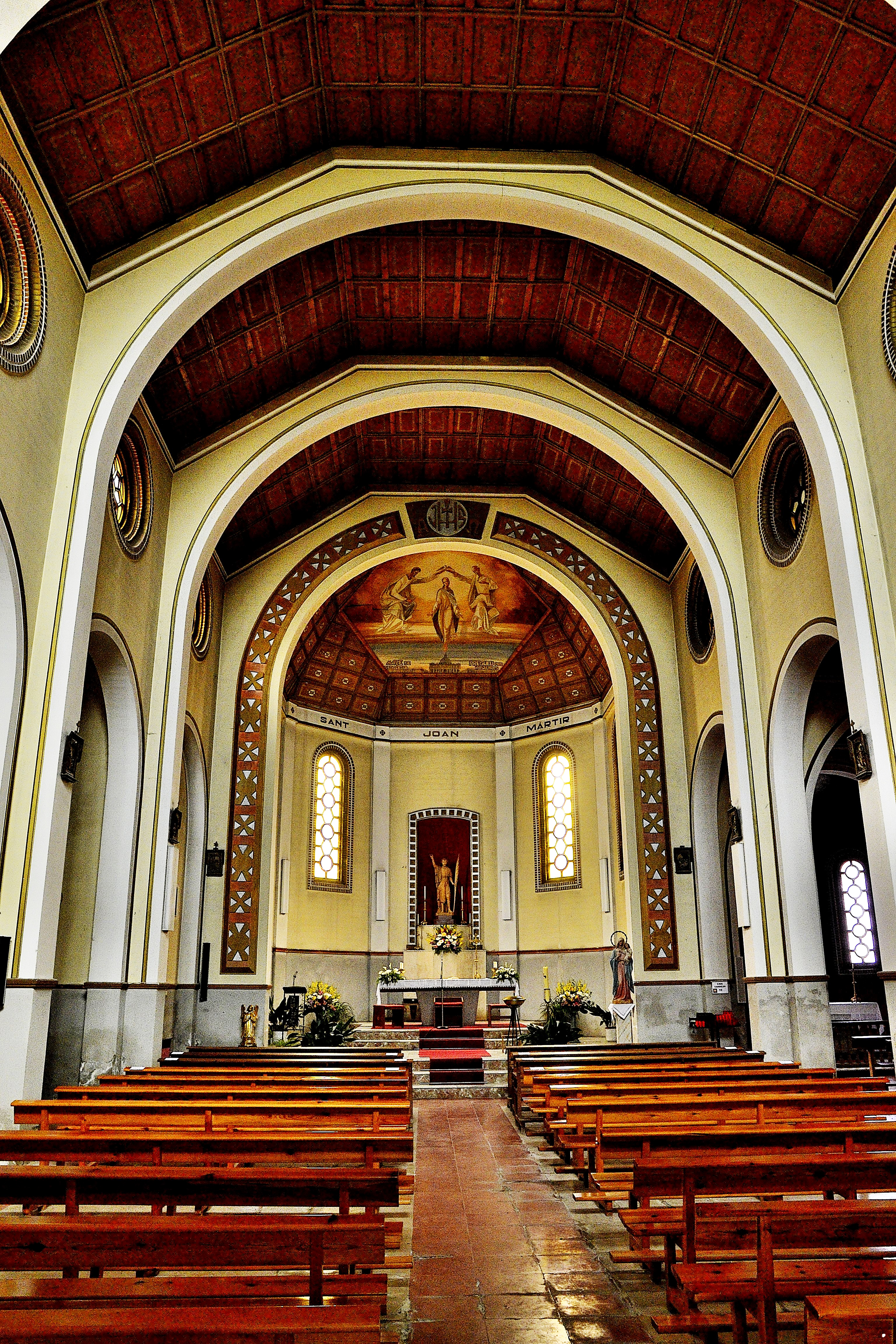 Iglesia de San Juan Bautista en Penelles (Lleida)